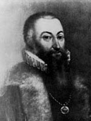 Godhard Kettler, 1517-1587.